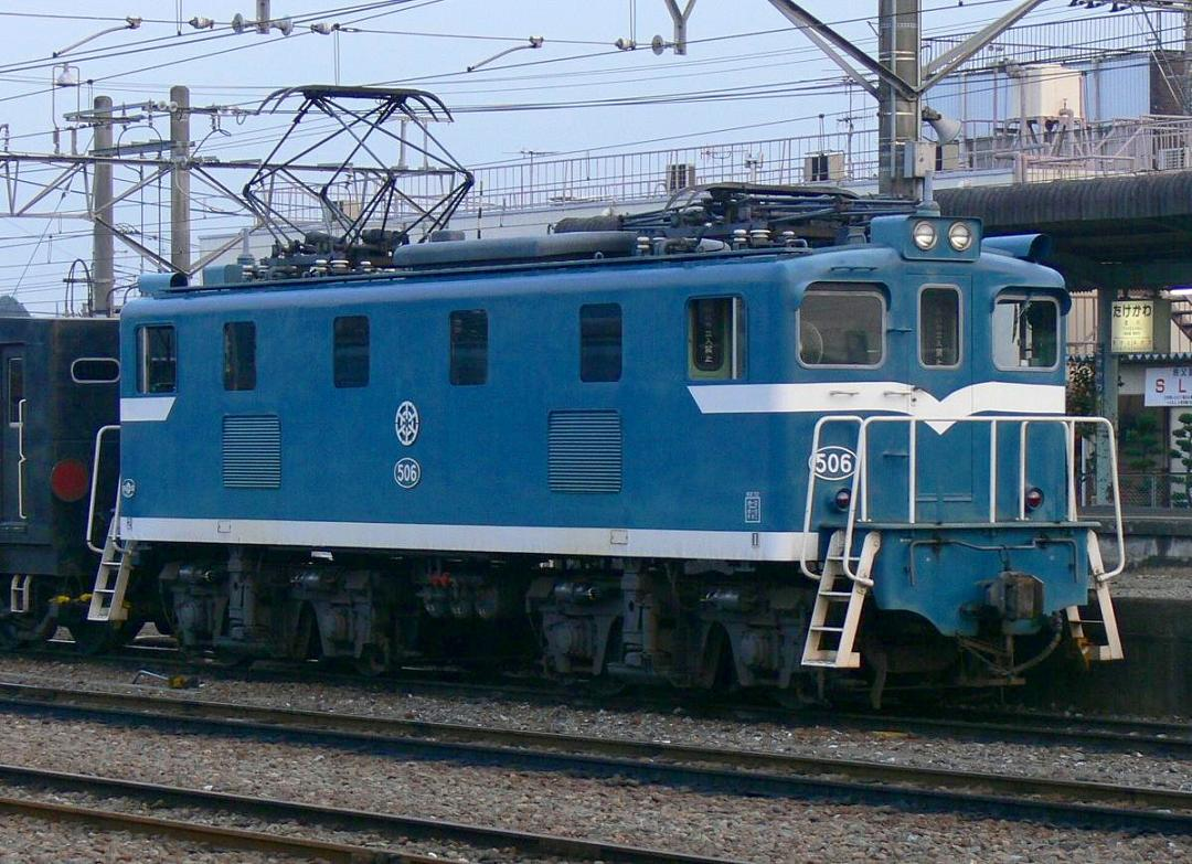 秩父鉄道デキ500形電気機関車506号機